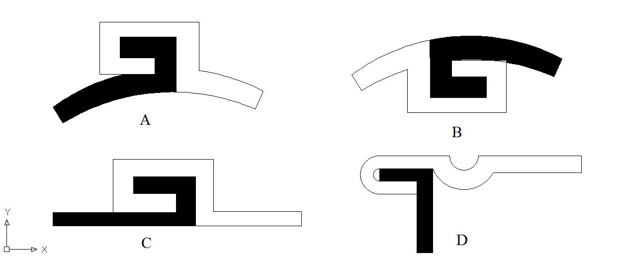 Grapeado